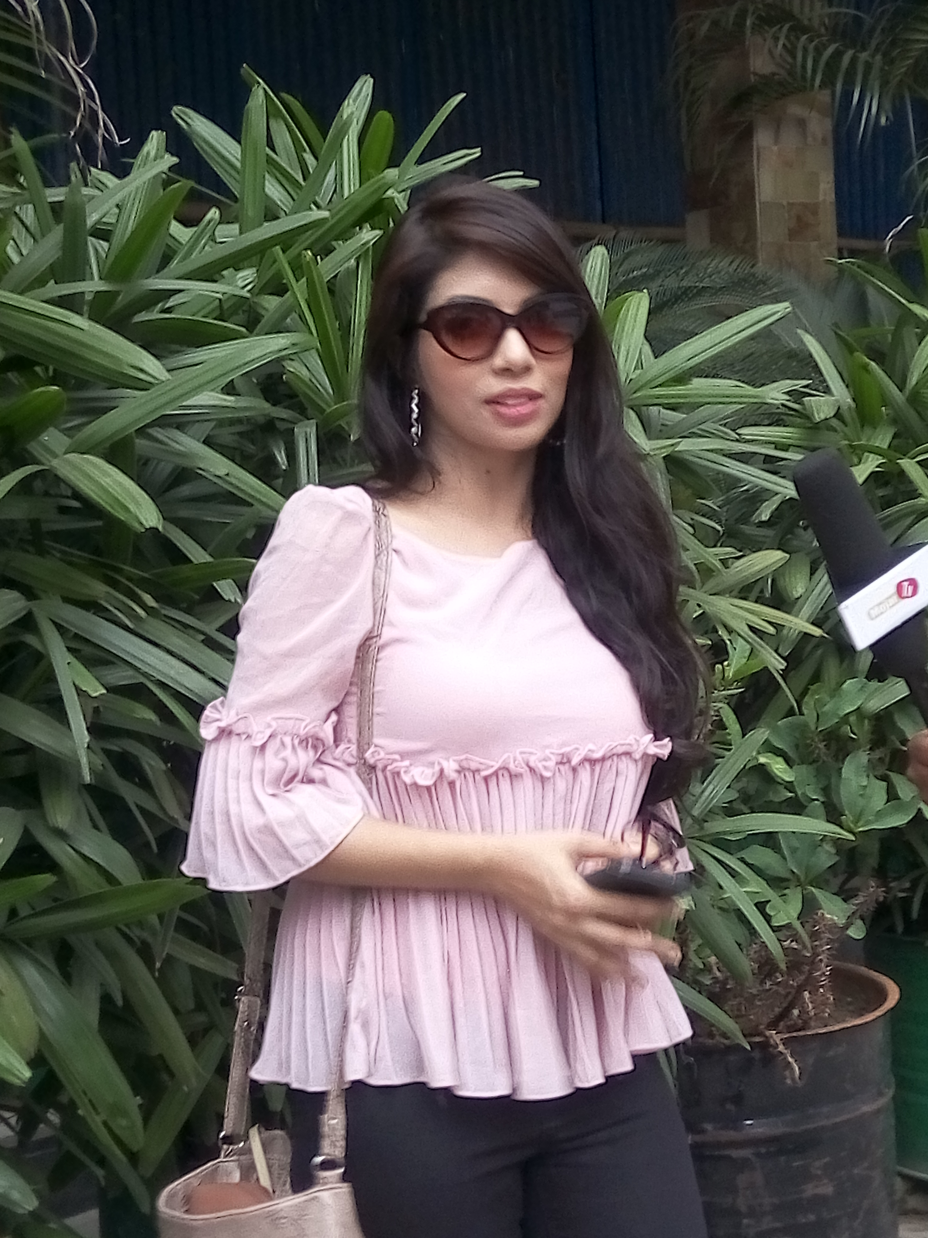 বলাকা সিনেওয়ার্ল্ডে কাজী নওশাবা আহমেদ, ২০১৭